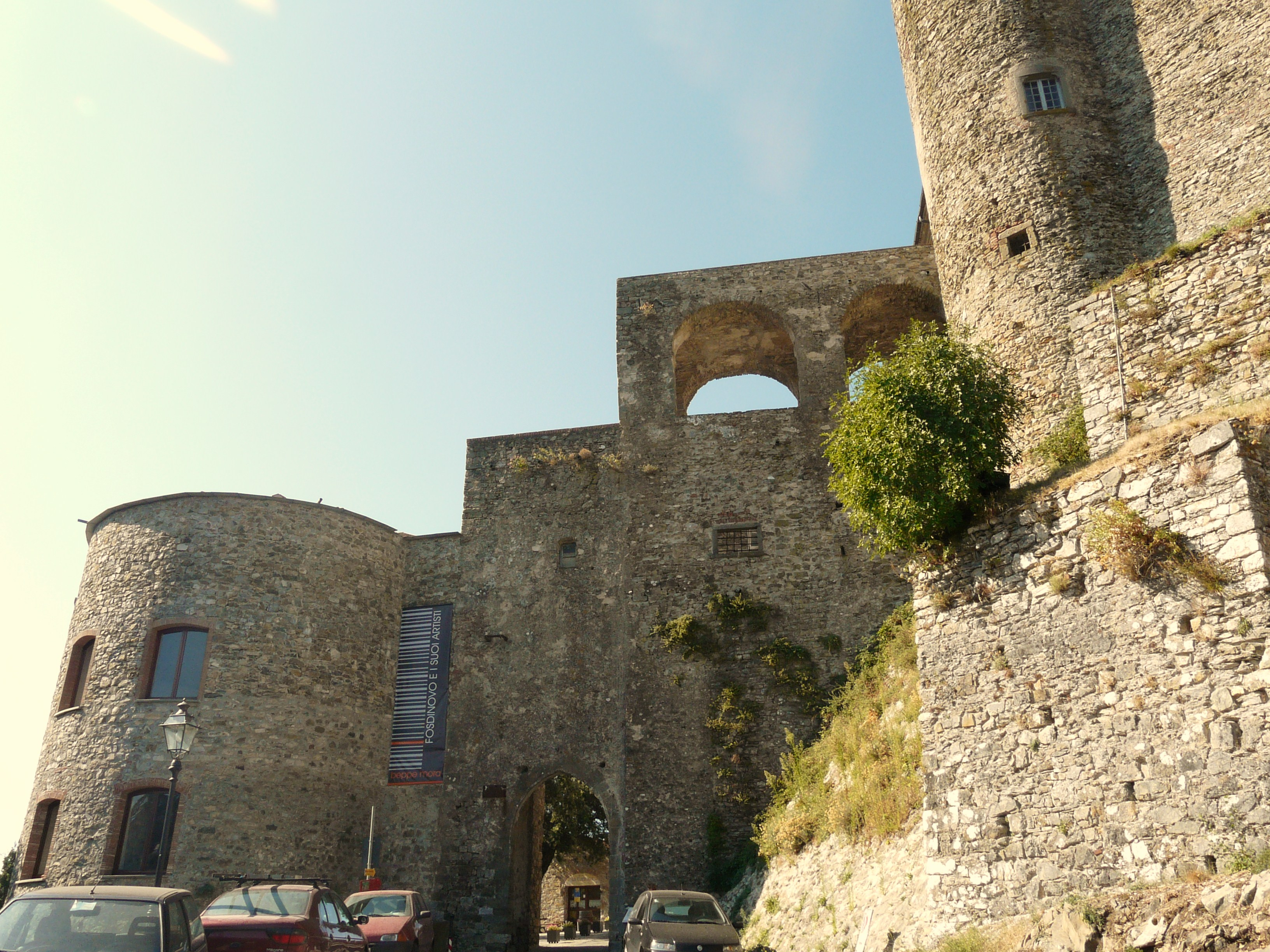 Castello Malaspina, Fosdinovo, Toscana, Italia